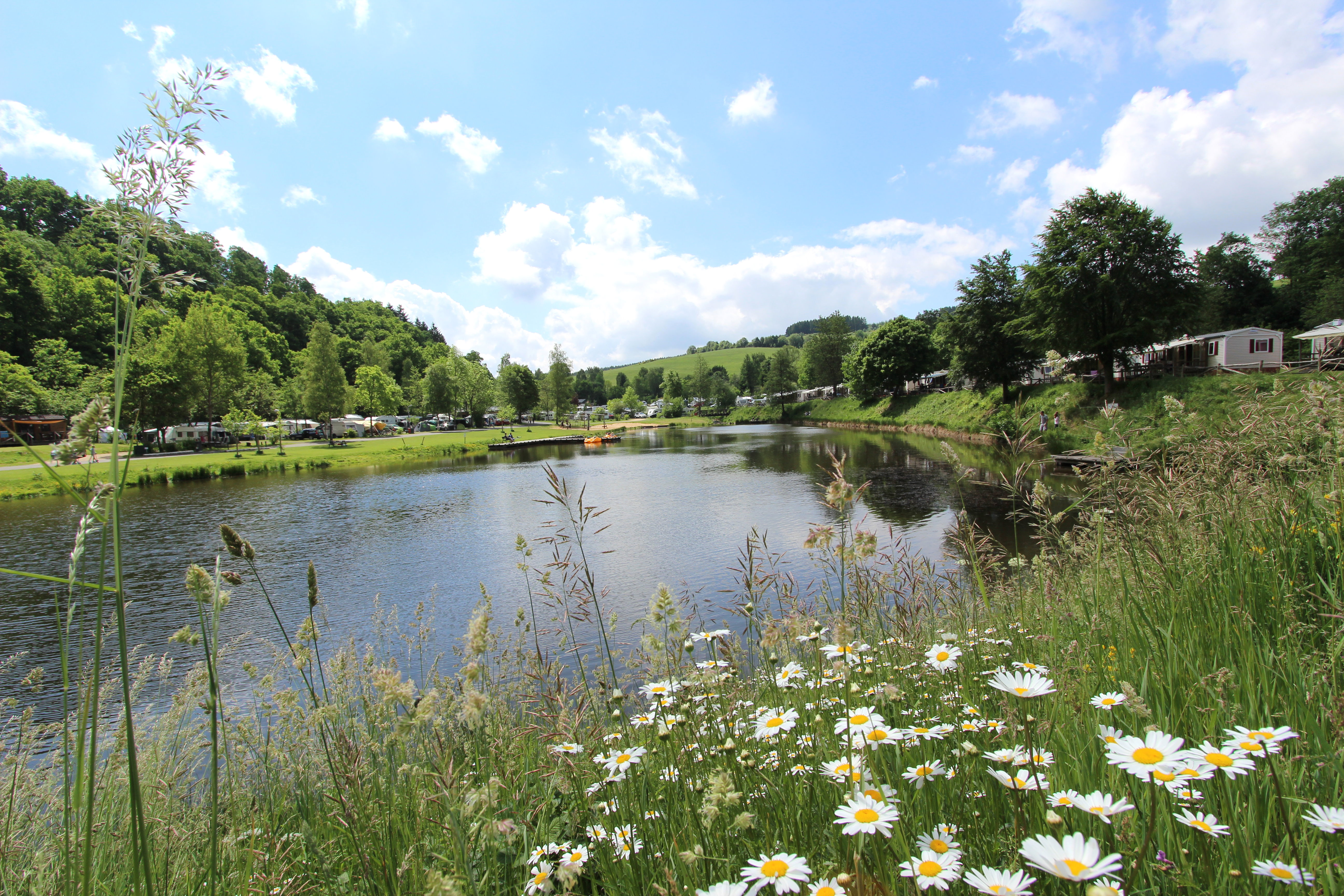 54589 Stadtkyll, an der K67 Richtung Schüller. Ferienpark mit Camping, Tennishalle, Wandern, Klettern, Spielplatz, Feriendorf, Waldjugend Camp, Restaurant. Aufnahme von 2017.